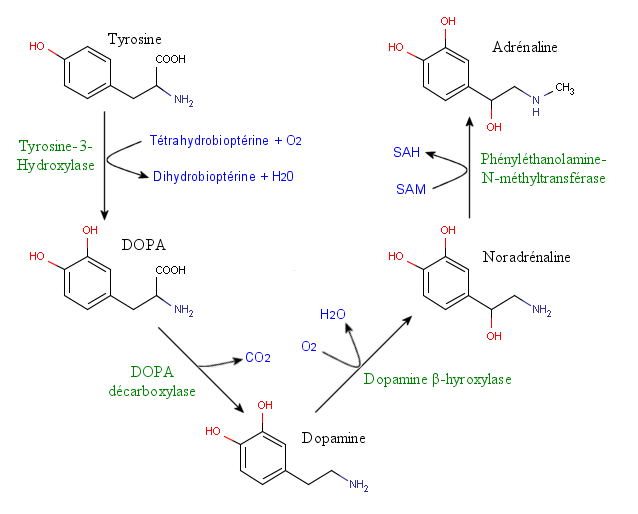 Voie de biosynthèse des catécholamines Auteur : Yohan